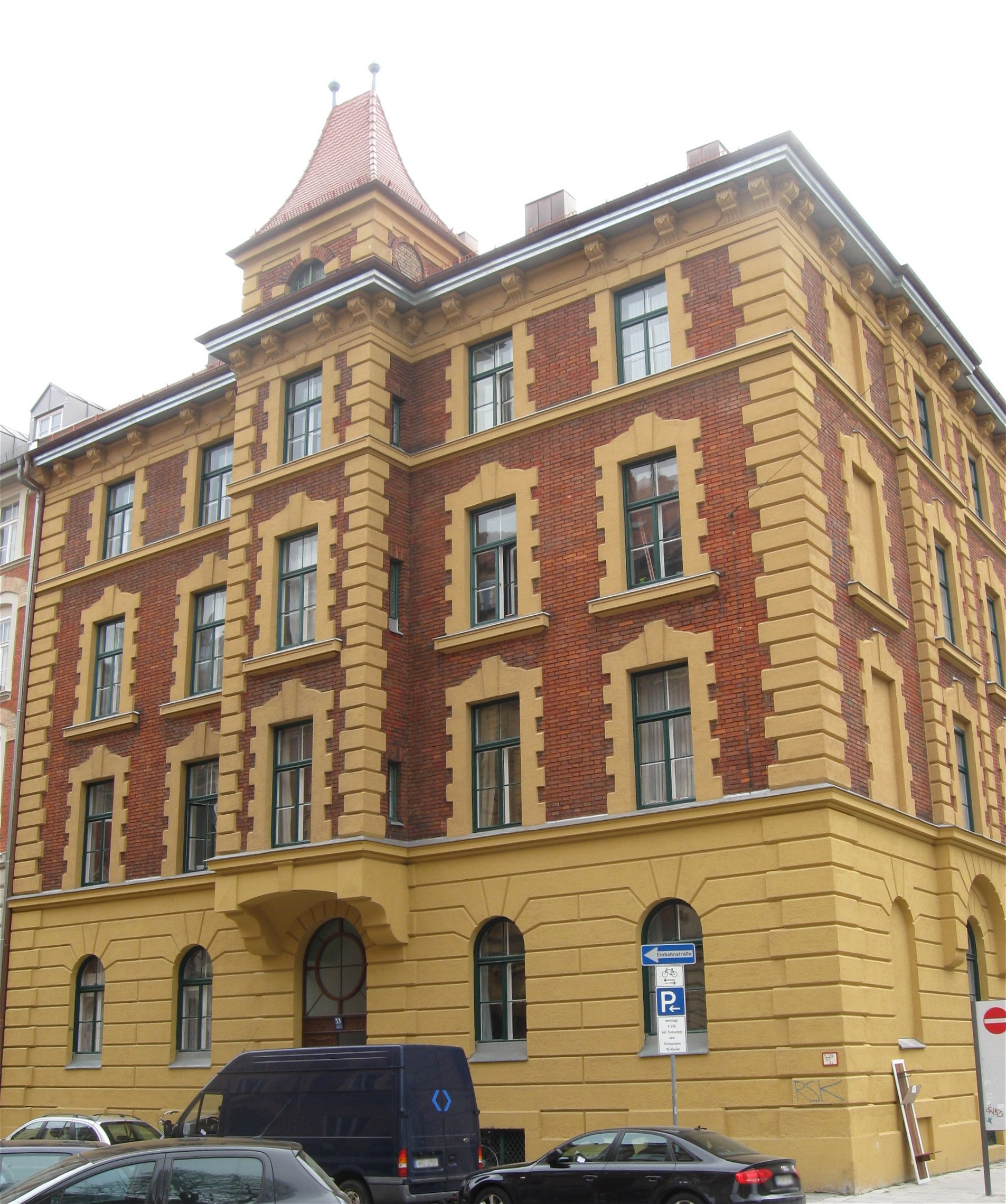 Adalbertstraße 53; Mietshaus, Eckbau mit Erkerturm, 1883 von Johann Widmann.